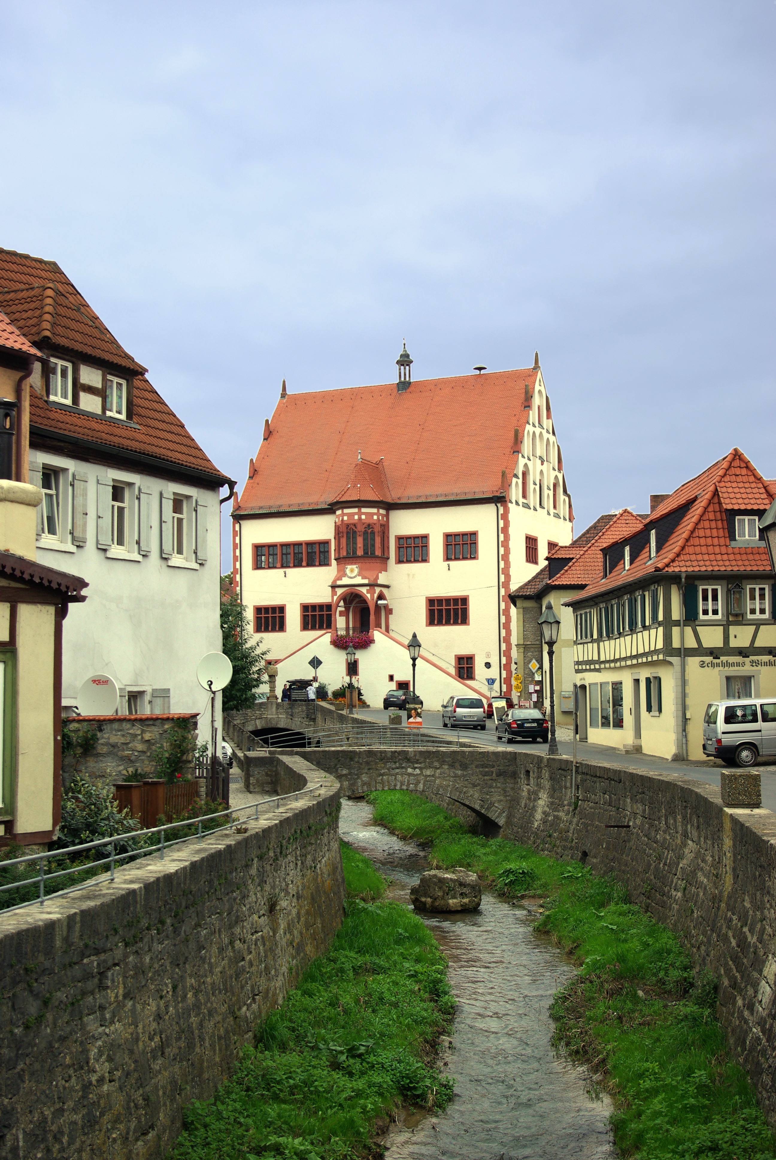 Dettelbach